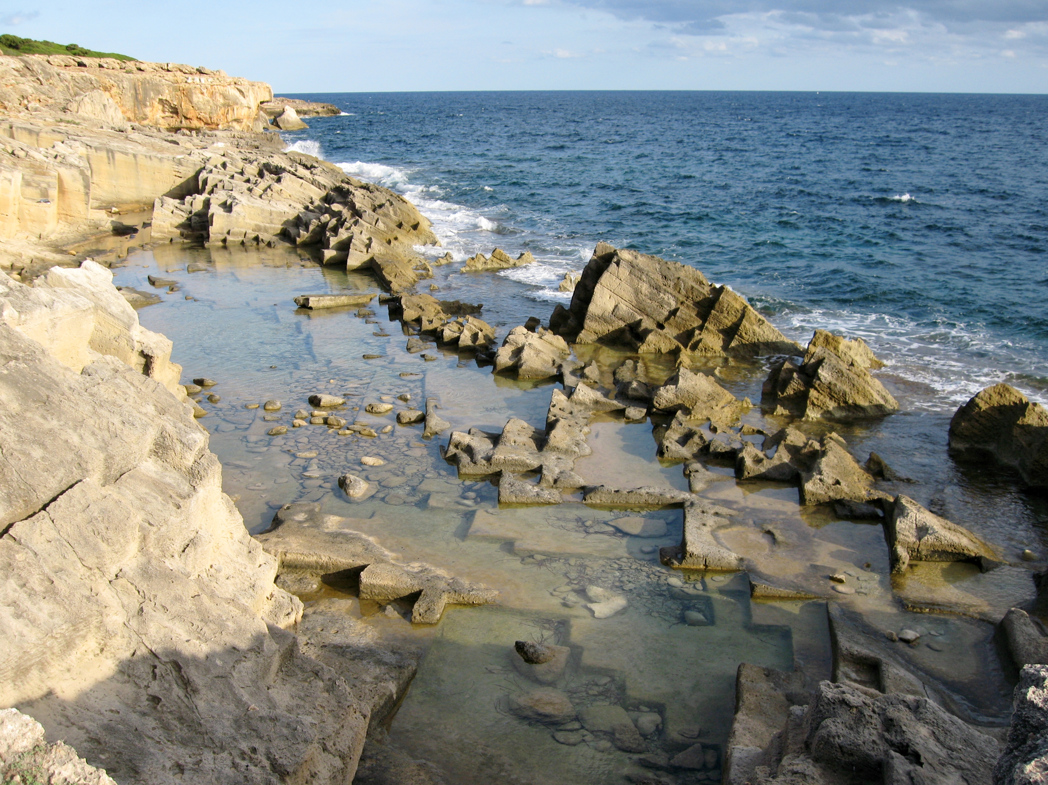 Punta de n'Amer, Sant Llorenç des Cardassar, Mallorca, Spain